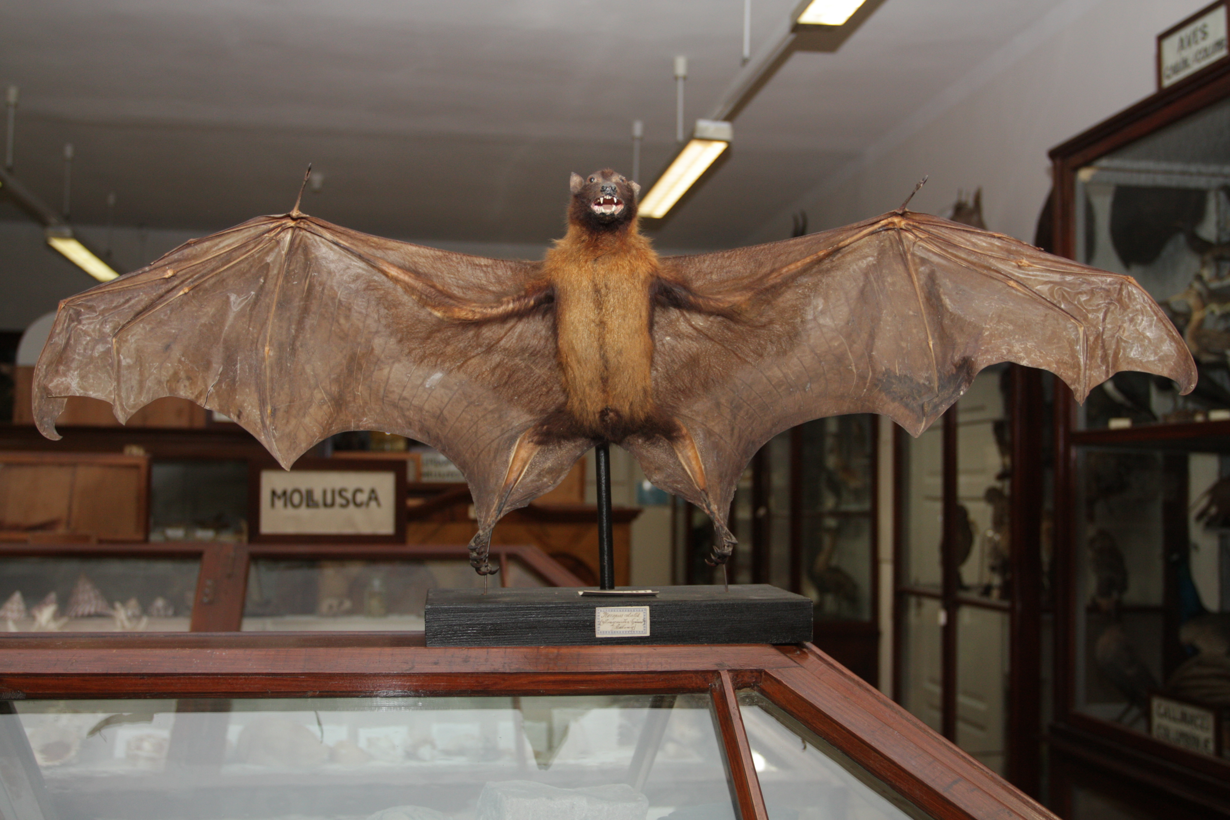 Im "Naturhistorischen Kabinett" des Vinzentinums werden zahlreiche Tierpräparate wie dieser Flughund aufbewahrt.